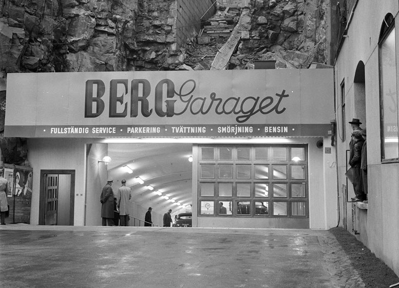 Entrén till skyddsrummet och garaget "Berg Garaget", under S:t Johannes kyrkogård. Fotograferat i samband med att det invigdes av "motorprinsen", Prins Bertil.